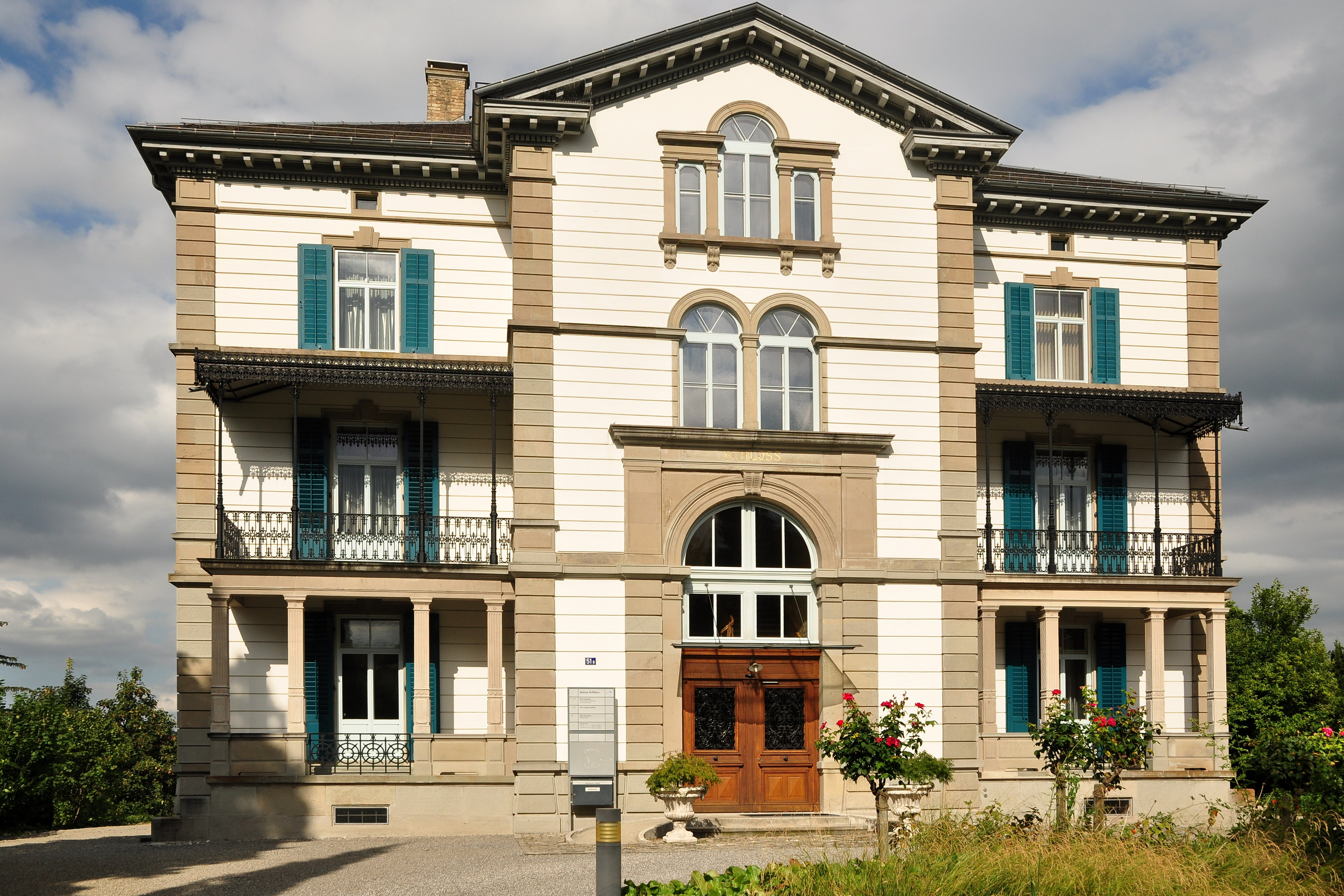 Sogenanntes «Jenny Schloss» mit Nebenbauten, Mühlebachstrasse 51b in Thalwil (Switzerland)